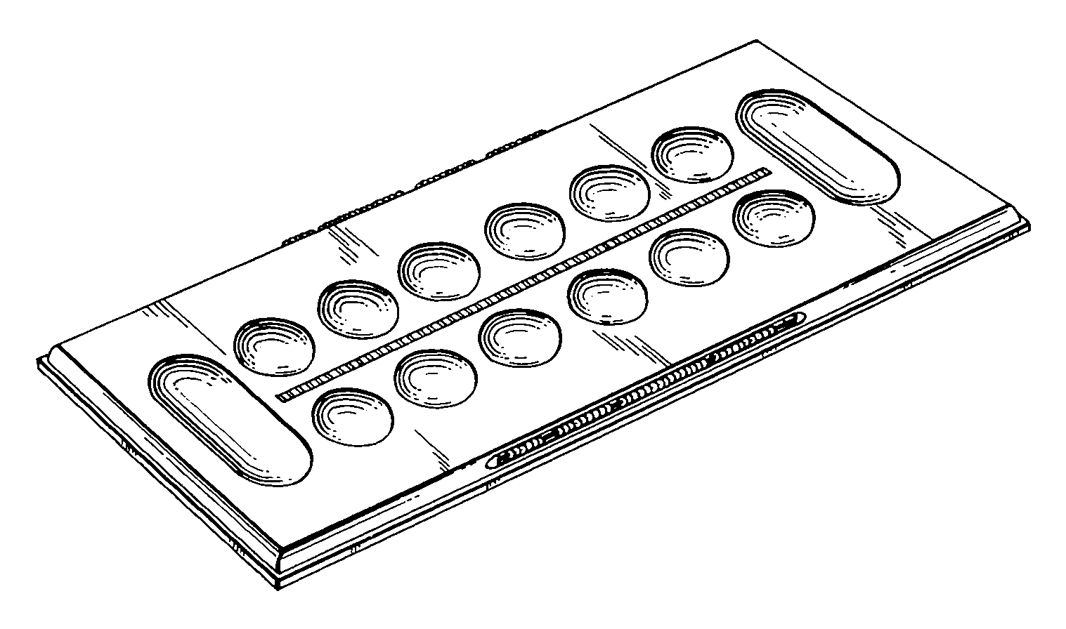 Чертёж доски для игры в калах. Патент US D165634.